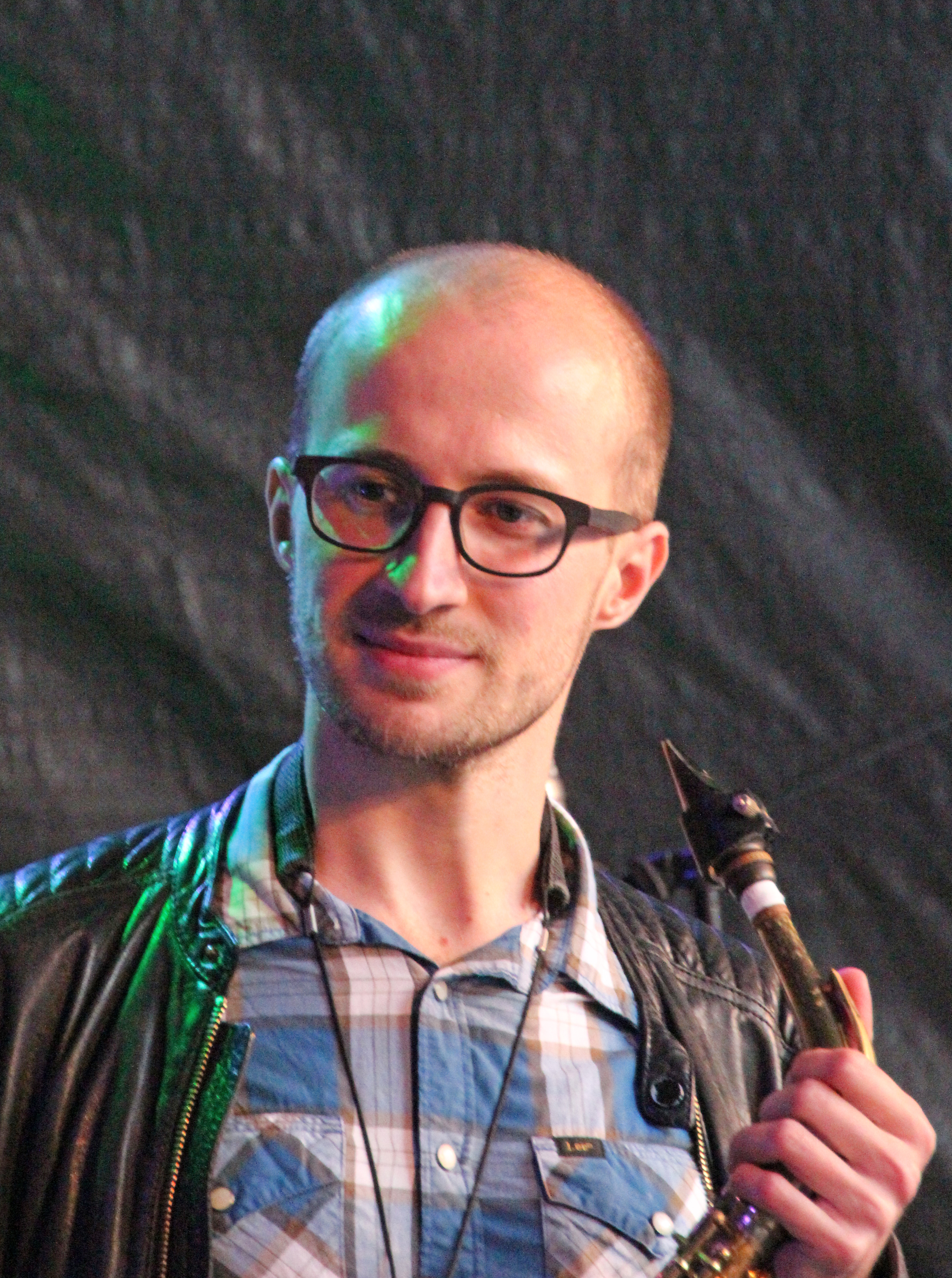 Bildinhalt: Evgeny Ring bei den 22. Jazztagen Idar-Oberstein 2017 Aufnahmeort: Idar-Oberstein, Deutschland Die dargestellte Person wurde bei einem öffentlichen Auftritt fotografiert.